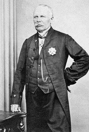 Sir Etienne Paschal Taché